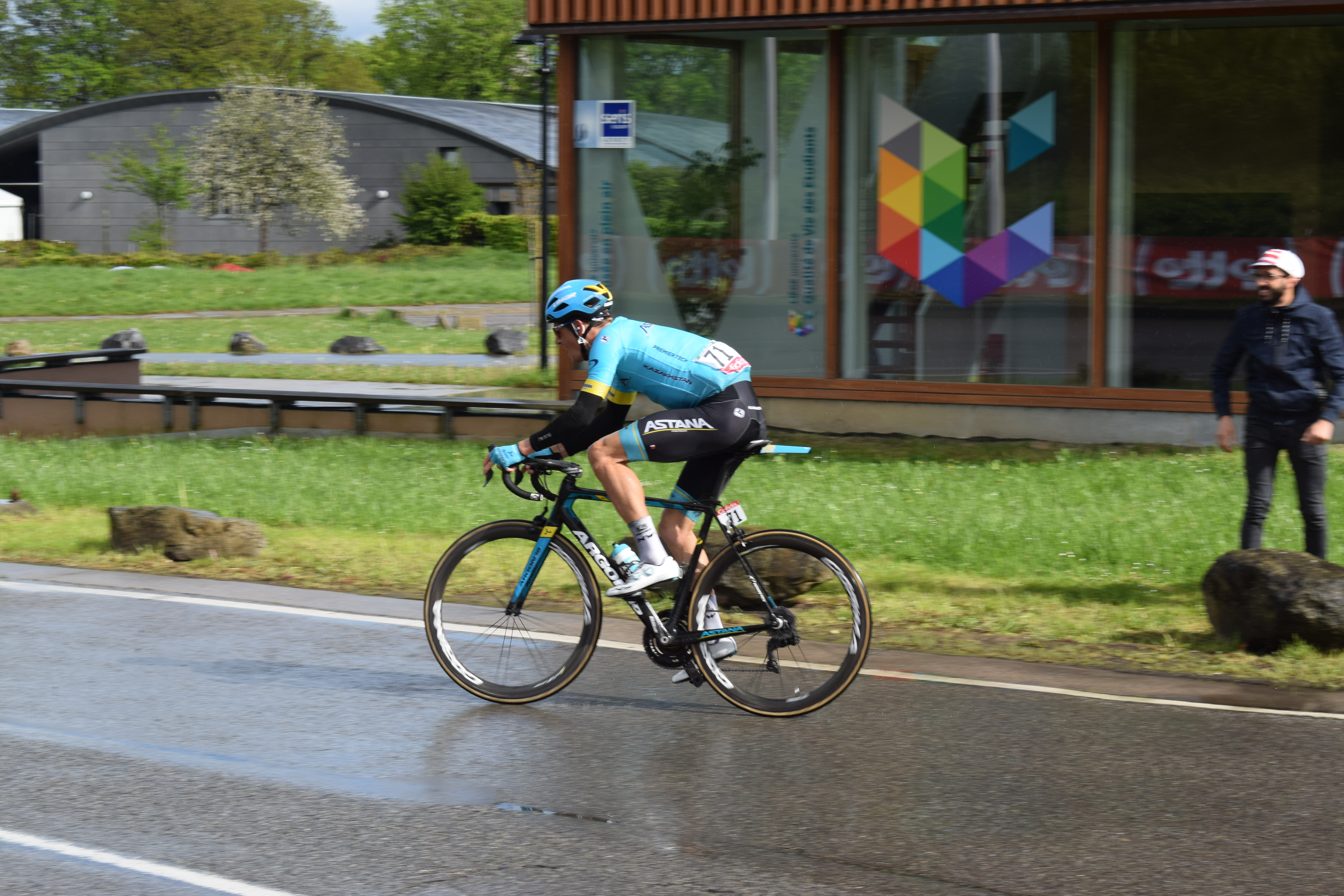 Vue du passage de la course cycliste Liège-Bastogne-Liège 2019, au rond-point Simone David-Constant, sur le campus du Sart Tilman de l'Université de Liège.